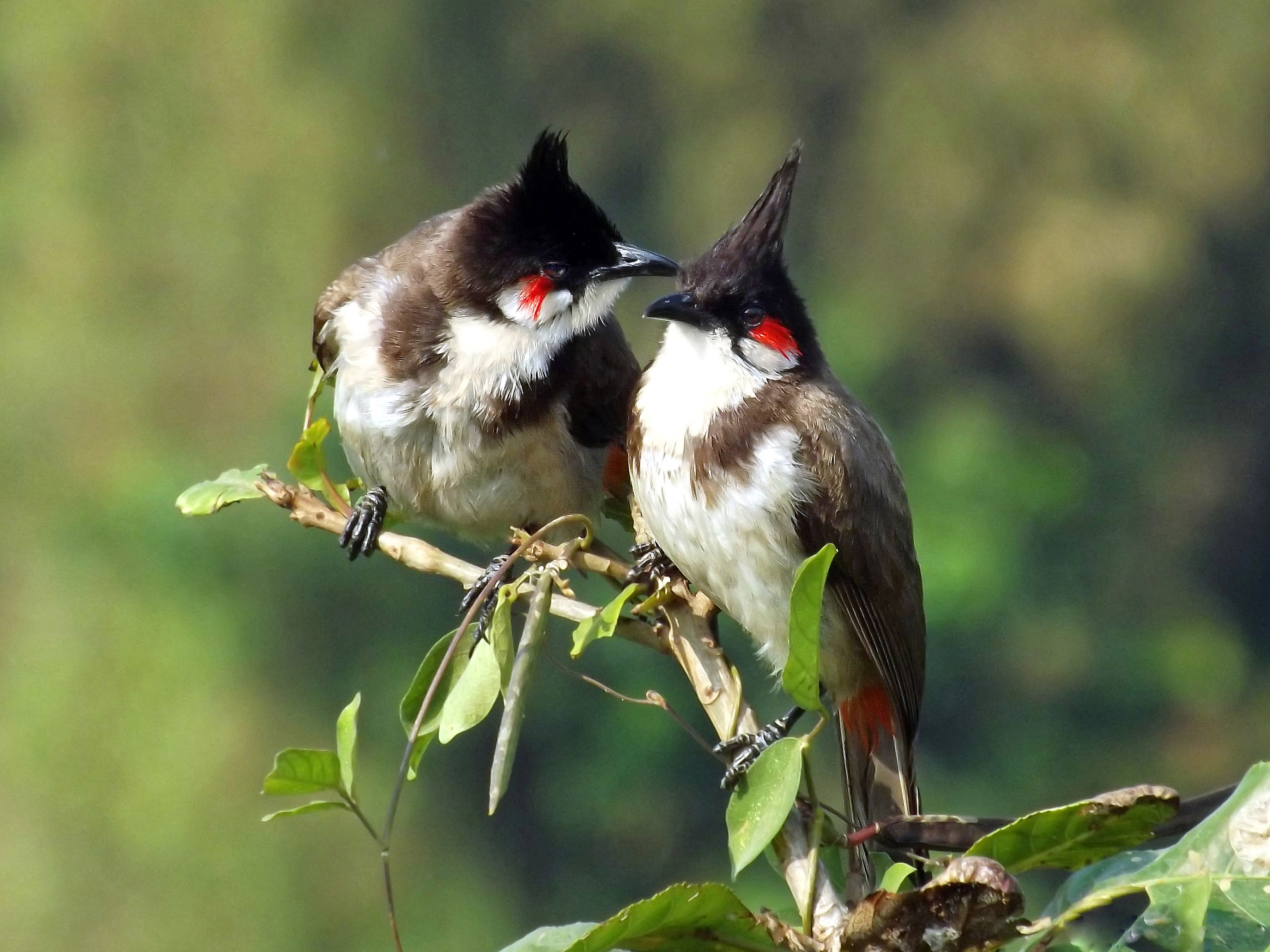 ഇരട്ടത്തലച്ചി, തൊപ്പിക്കിളി